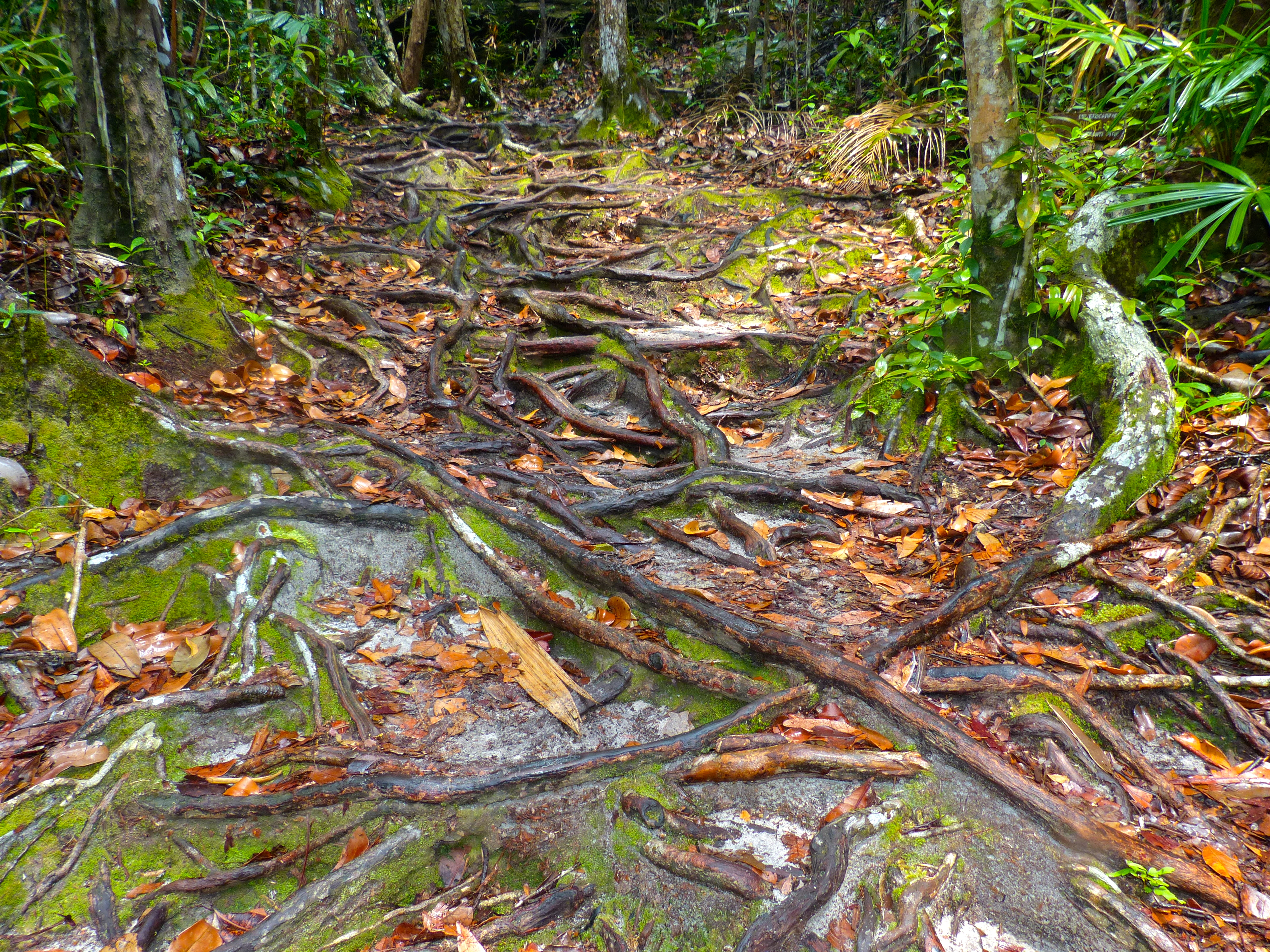 Lintang Trail, Bako NP, Sarawak, MALAYSIA